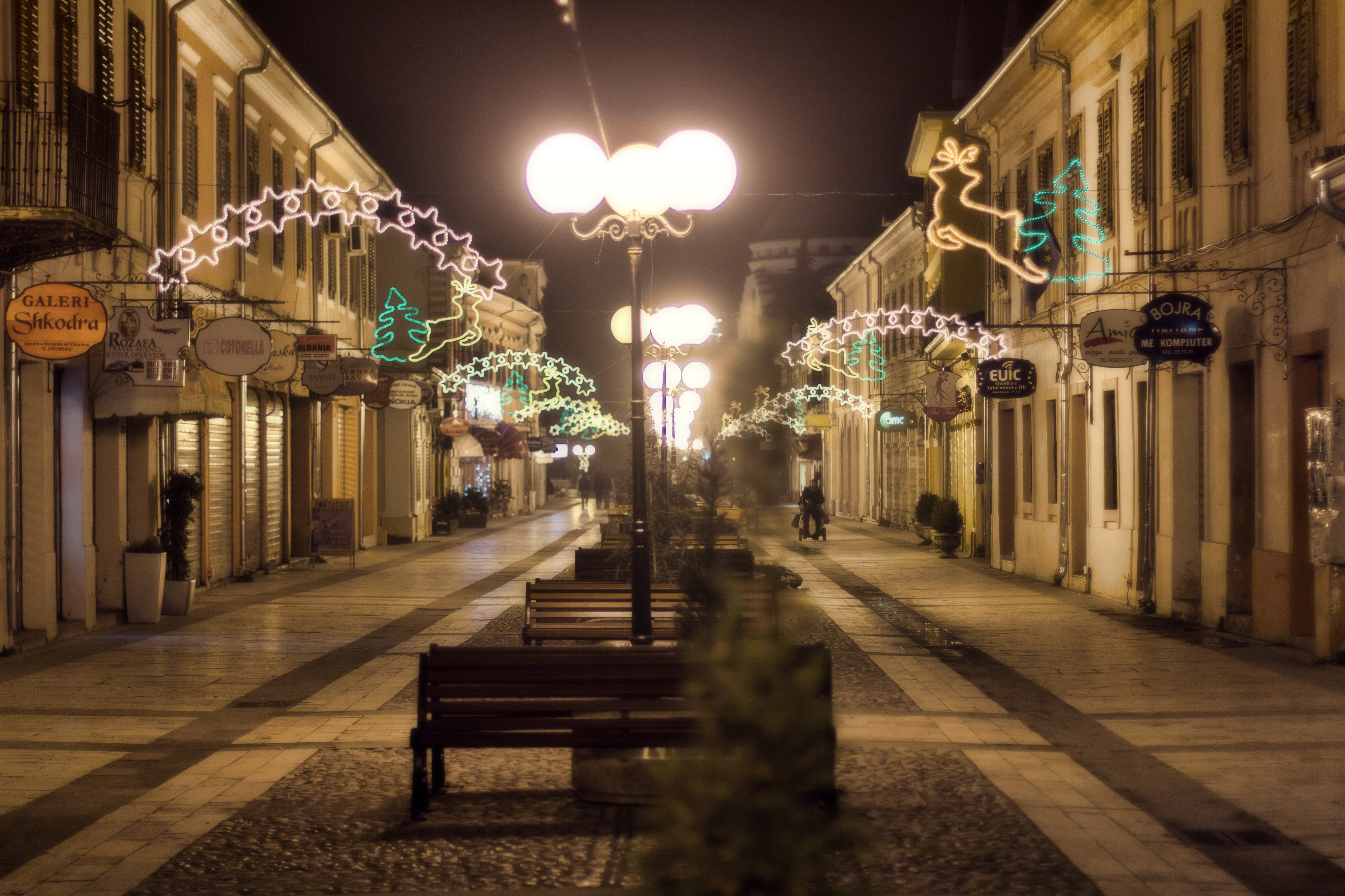 Kjo eshte pjesa antike e qytetit te Shkodres e zbukuruar per festat e fundvitit 2013